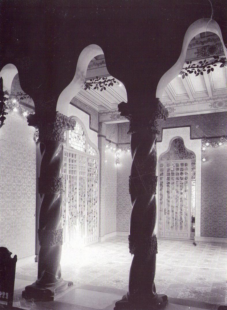 Casa Trinxet, característica del modernisme catalán, estuvo ubicada en Calle Còrcega, 268, Barcelona, España.